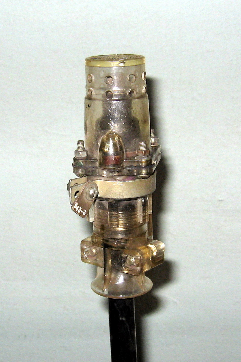 Methane sensor of Automatic methane defence device from the complete set of AT1-1, AT3-1 ("Methane") Детектор (давач) концентрації метану з апаратури автоматичного газового захисту і автоматичного централізованого контролю метану з комплекту АТ1-1, АТ3-1 ("Метан").